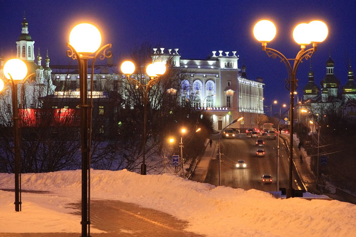 Крестовоздвиженская (Никольская) церковь, Тюменская государственная архитектурно-строительная академия, Никольский мост и Свято-Троицкий монастырь (Тюмень)